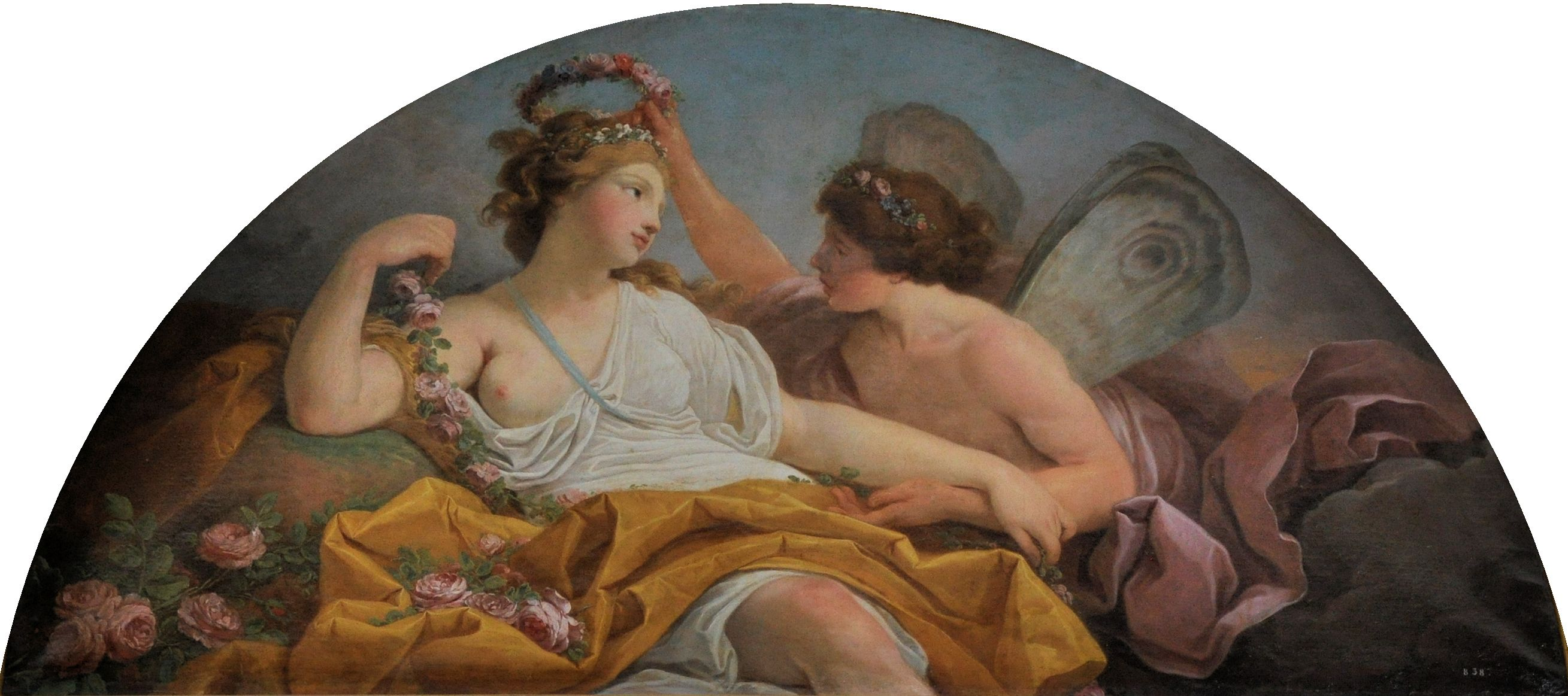 Charles Monnet -Zéphir et Flore - 1768, dessus-de-porte